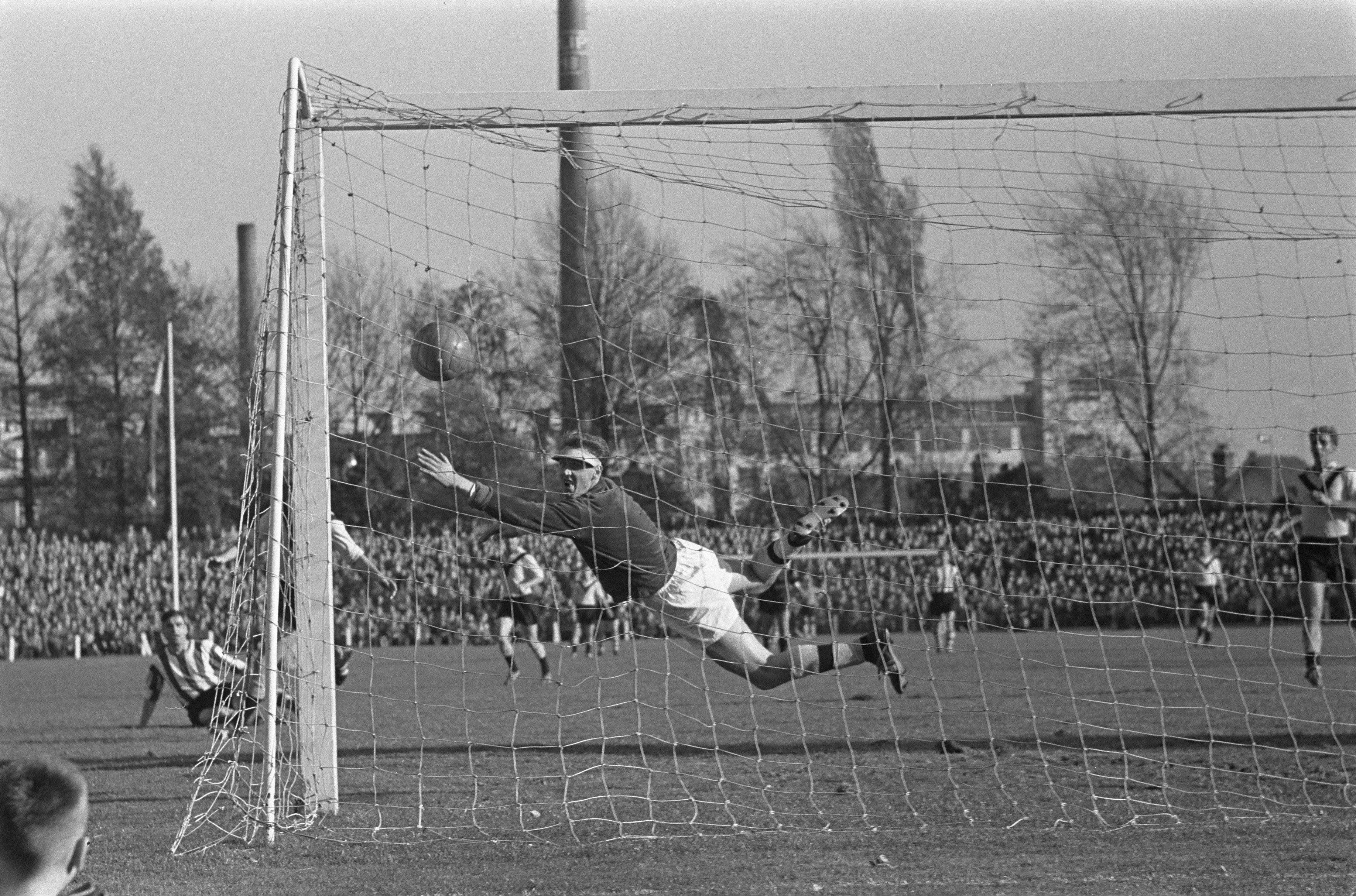 Collectie / Archief : Fotocollectie Anefo Reportage / Serie : [ onbekend ] Beschrijving : PSV tegen DOS 4-0, Coen Dillen scoort het eerste doelpunt, doelman Jan van de Wint duikt tevergeefs Datum : 18 oktober 1959 Locatie : Eindhoven, Noord-Brabant Trefwoorden : sport, voetbaldoelpunten Persoonsnaam : Dillen, Coen, Wint, Jan van de Instellingsnaam : DOS Fotograaf : Pot, Harry / Anefo Auteursrechthebbende : Nationaal Archief Materiaalsoort : Negatief (zwart/wit) Nummer archiefinventaris : bekijk toegang 2.24.01.05 Bestanddeelnummer : 910-7512